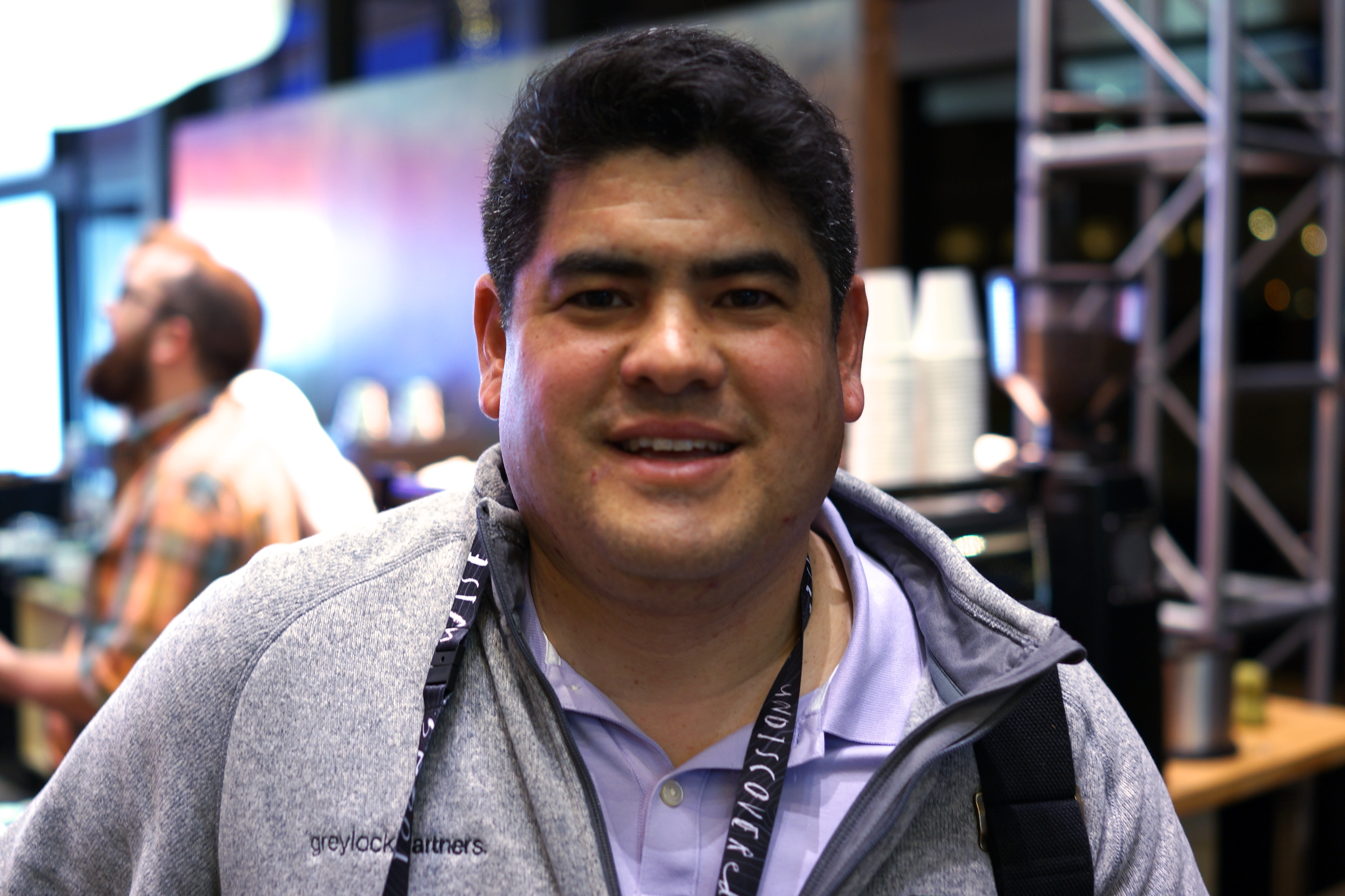 David Sze in 2013.